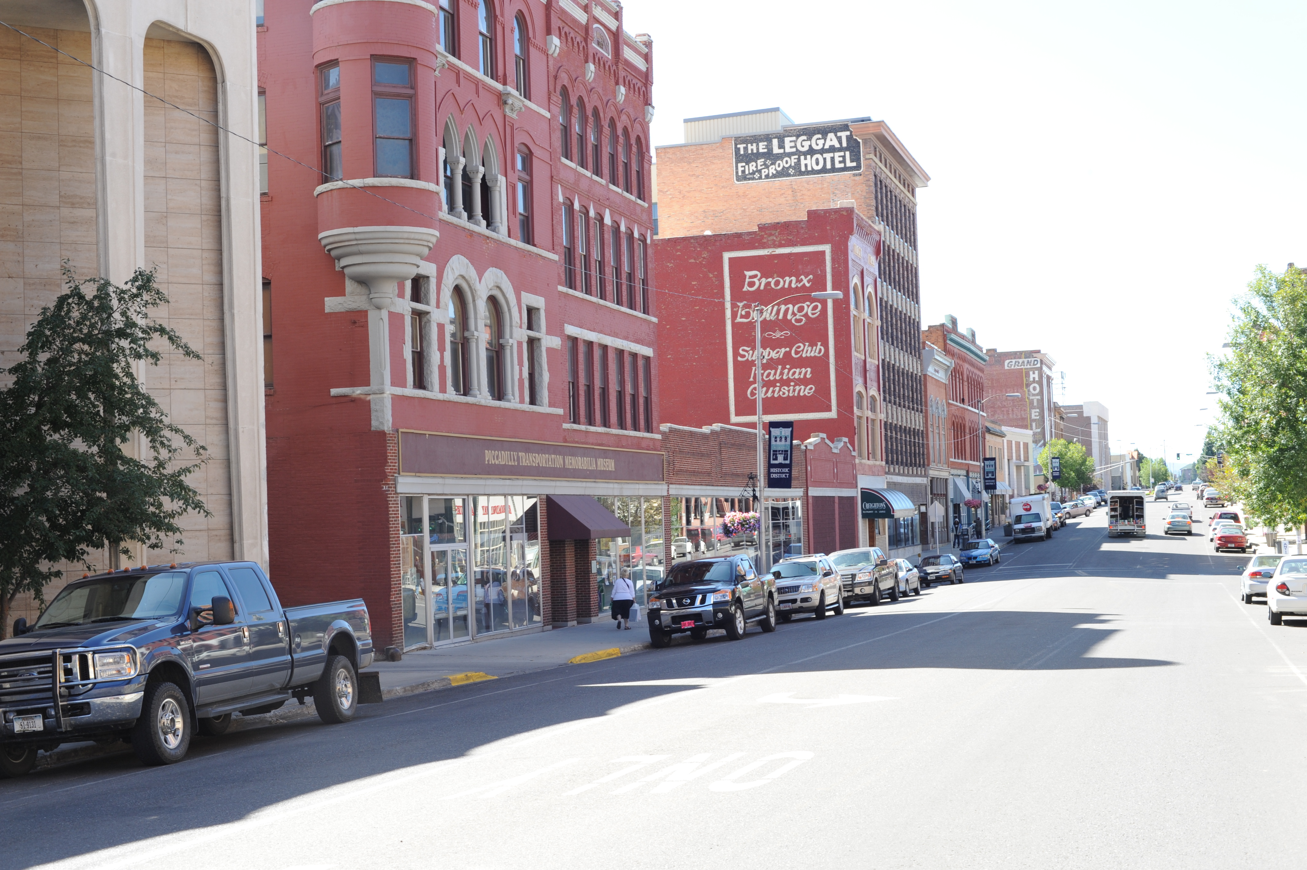 アメリカ モンタナ州ビュートの町並み